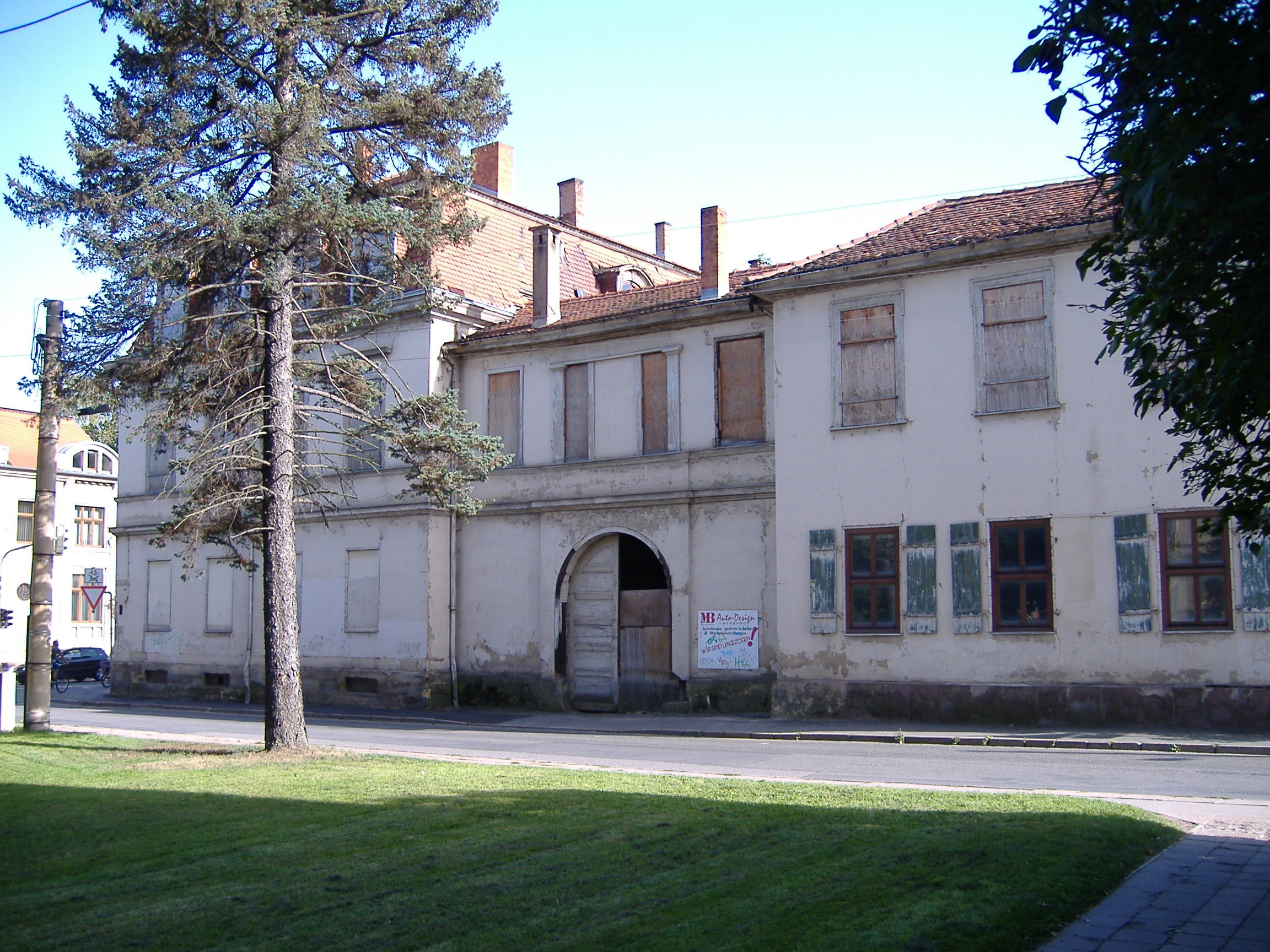 Winterpalais Gotha, Fassade-Eckhofplatz 2006